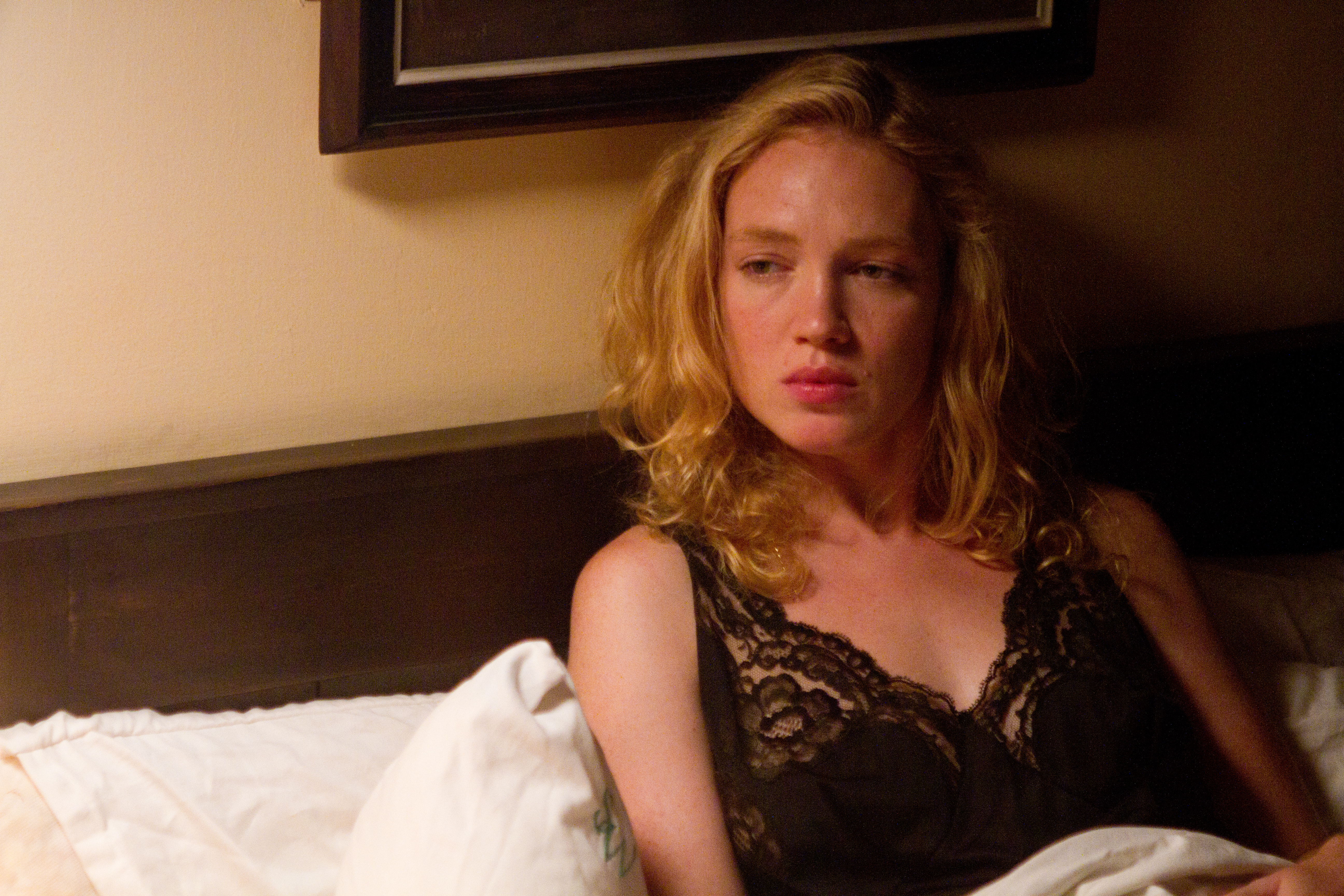 אלונה איב בסרטה של דינה צבי ריקליס ברקיע החמישי